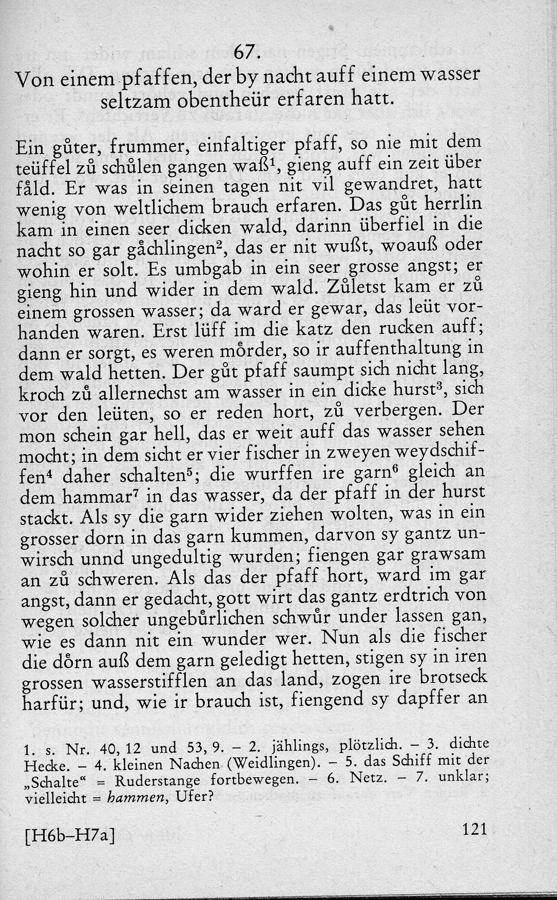 Rollwagenbüchlin S. 121